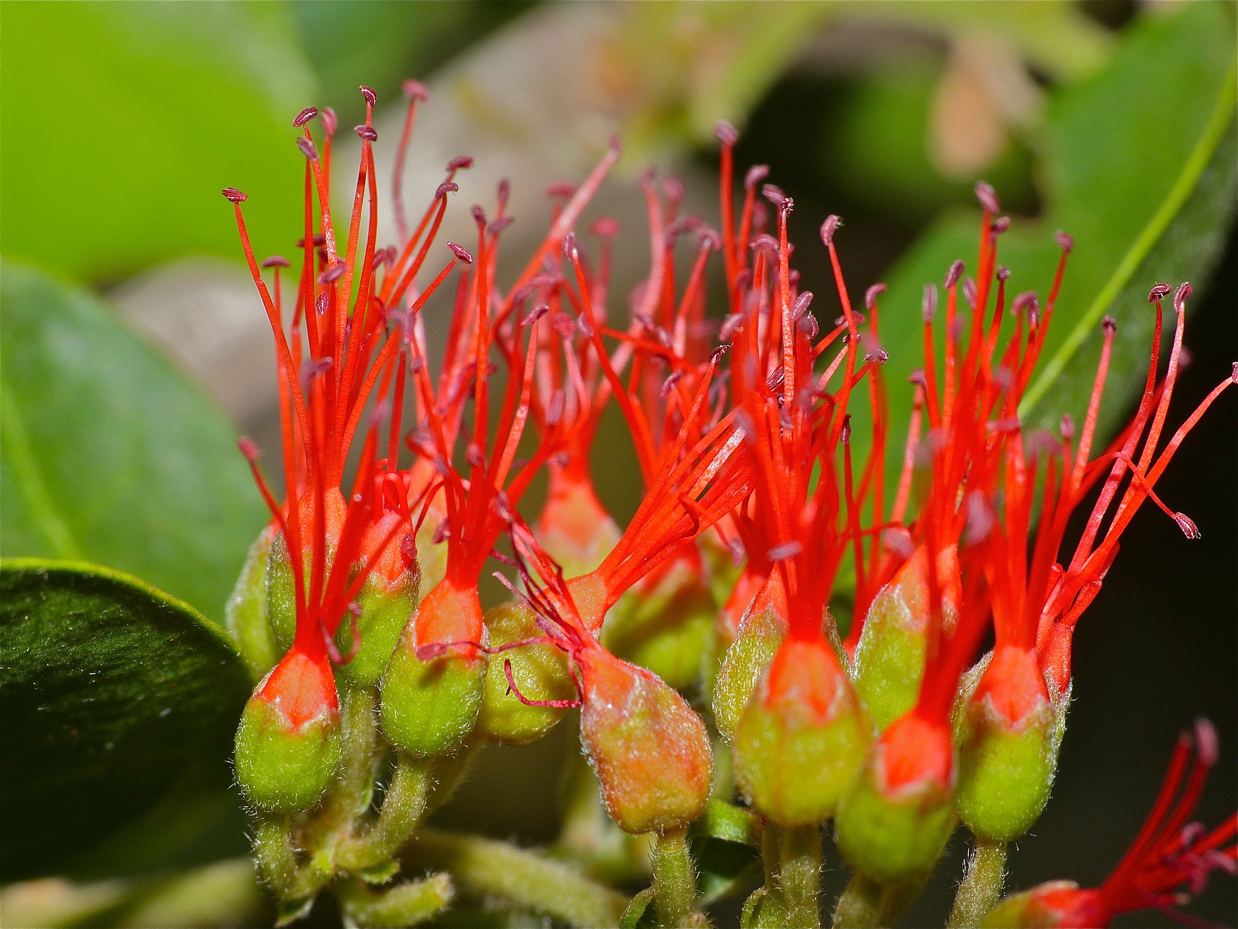 Lower Sabie Camp, Kruger NP, SOUTH AFRICA